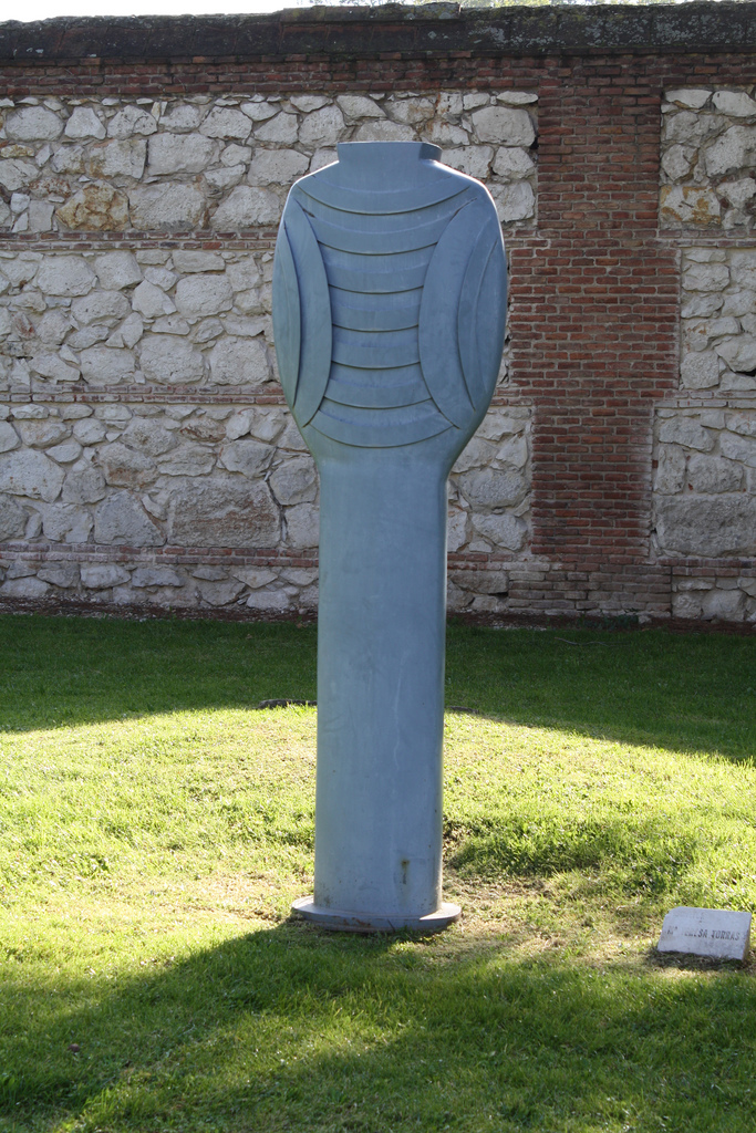 Museo de escultura al aire libre.Escultora: María Teresa Torras.Alcalá de Henares.Comunidad de Madrid.España